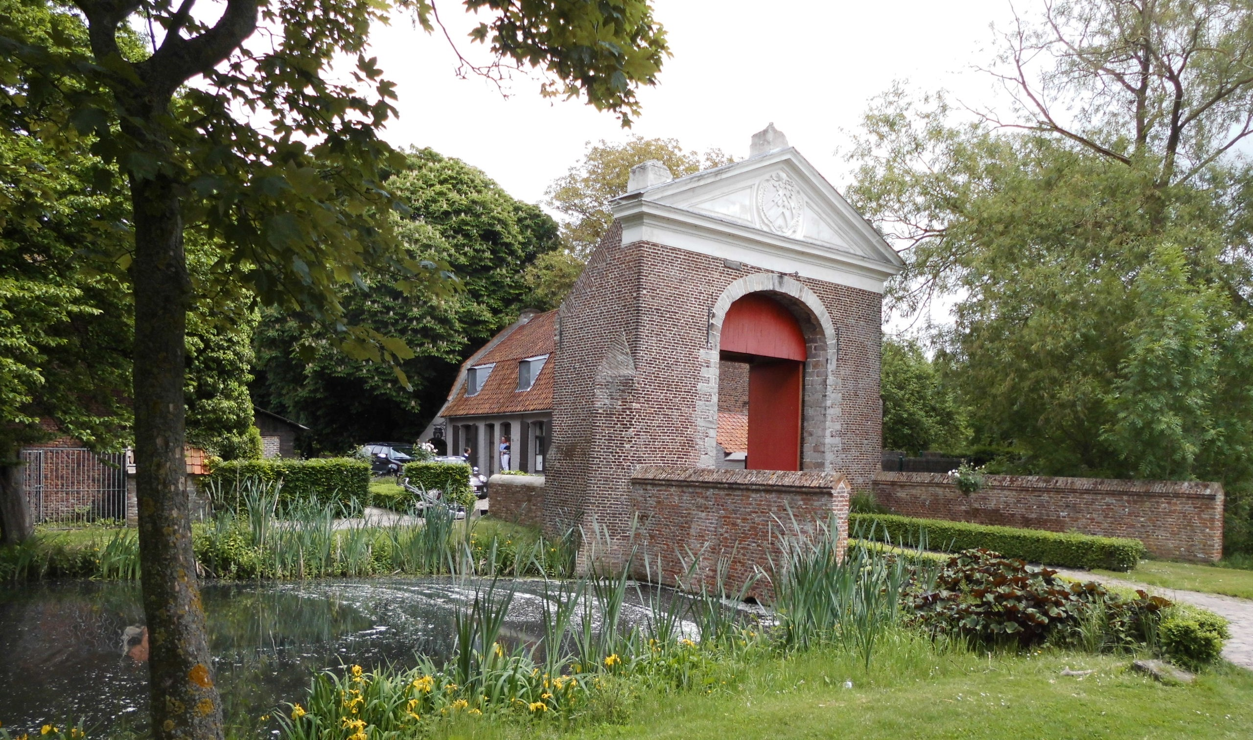 De Westpoort van de Guldenbergabdij - Wevelgem - West-Vlaanderen - België